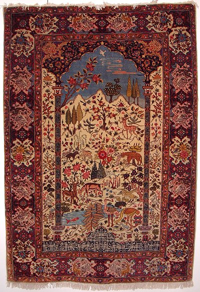 Deze foto van mijn eigen tapijt heb ik zelf gemaakt, u kunt deze foto ook vinden op mijn site met een beschrijving van het kleed. Correspondentie over het gebruik van deze foto kunt u voeren via via mijn site: Arie M. den Toom Ridderkerk 8 januari 2006